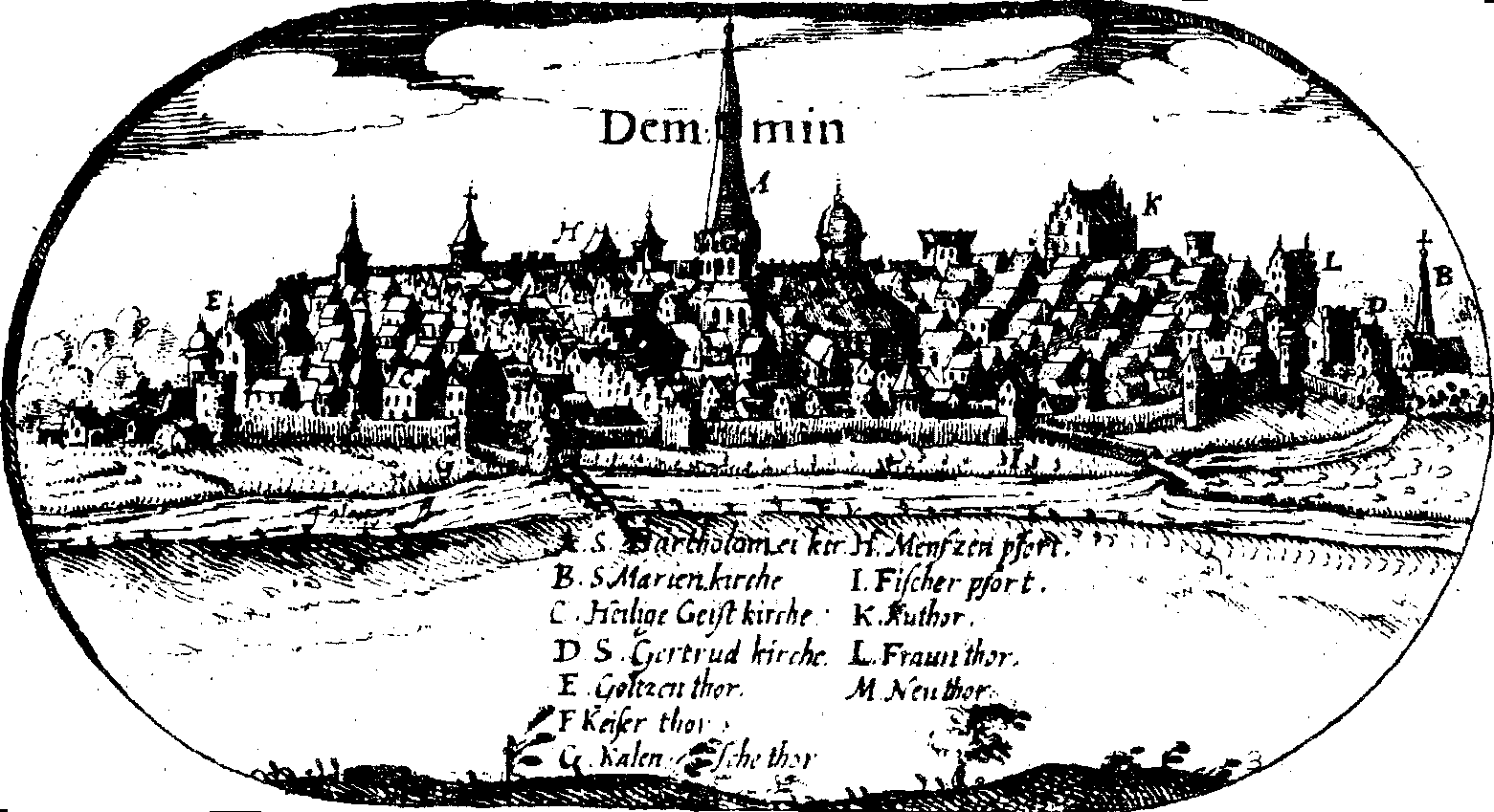 Ansicht von Demmin(zwischen 1614 und 1617)